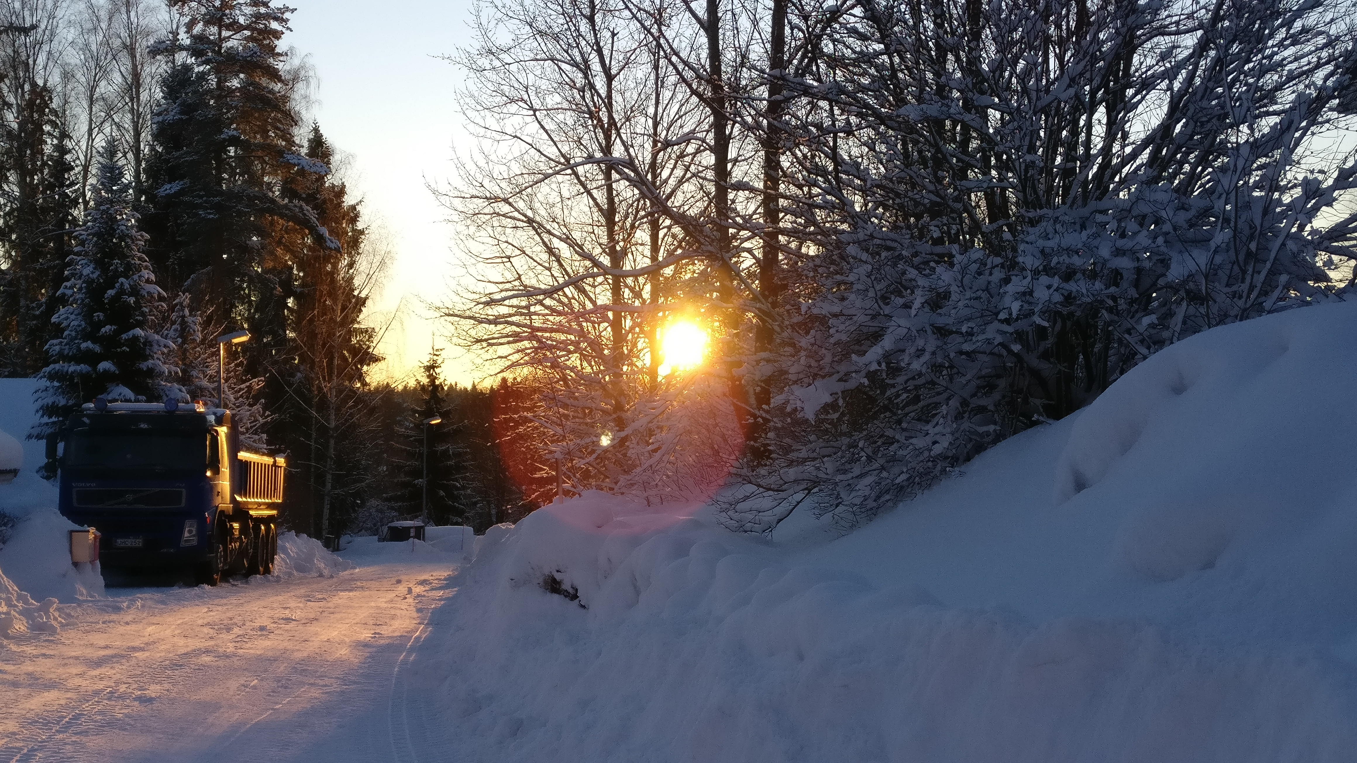 Talvinen kuva Matarista Jousimiehentieltä.